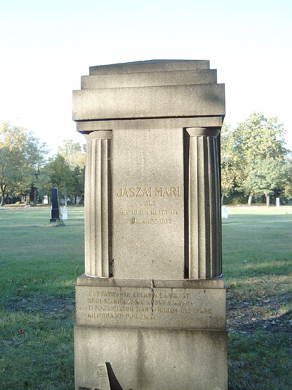 Jászai Mari sírja Budapesten. Kerepesi temető: 28-díszsor-18.